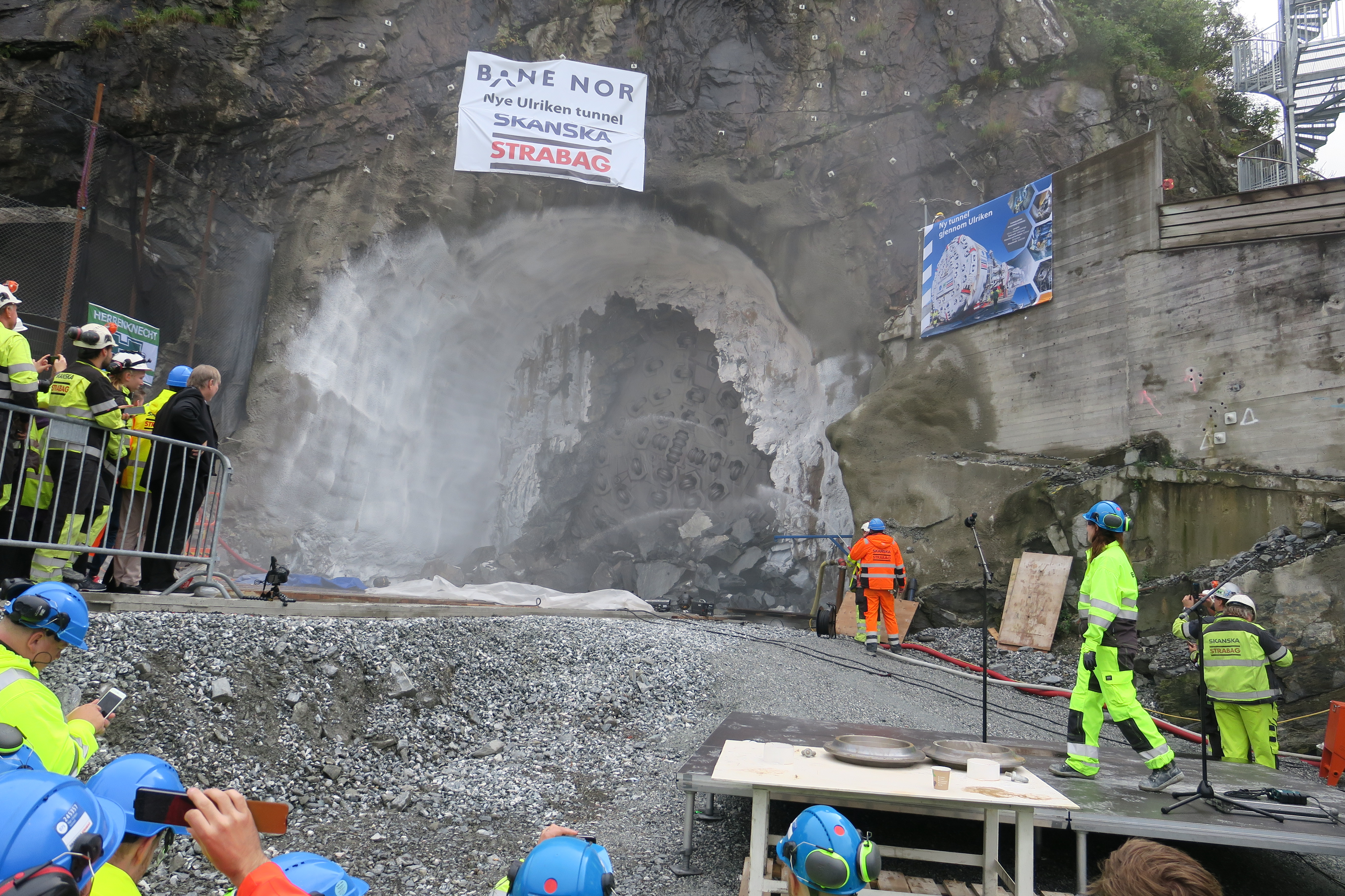 Gjennombrudd i Ulrikstunellen 29. august 2017